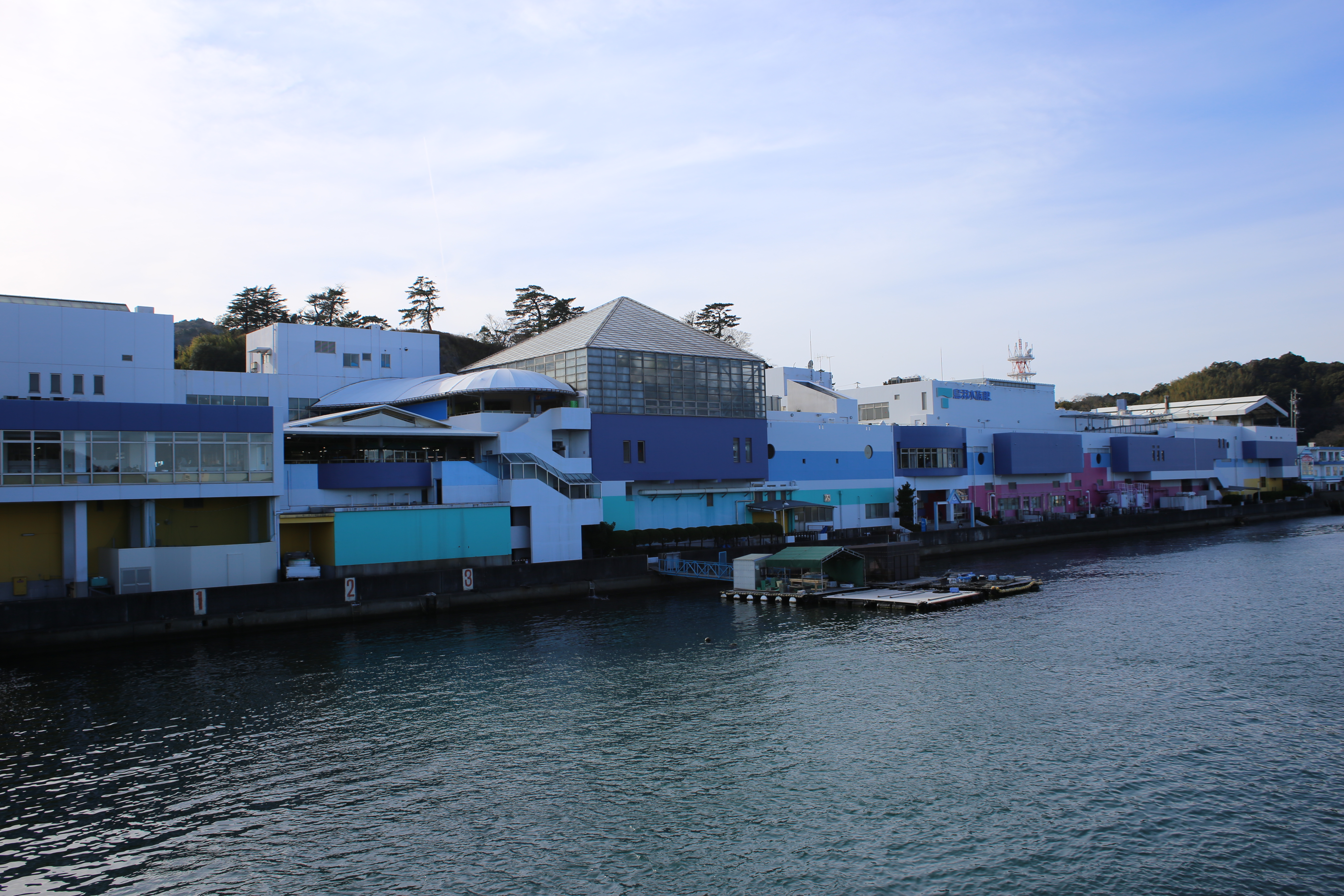 三重県鳥羽市の鳥羽水族館を洋上から撮影